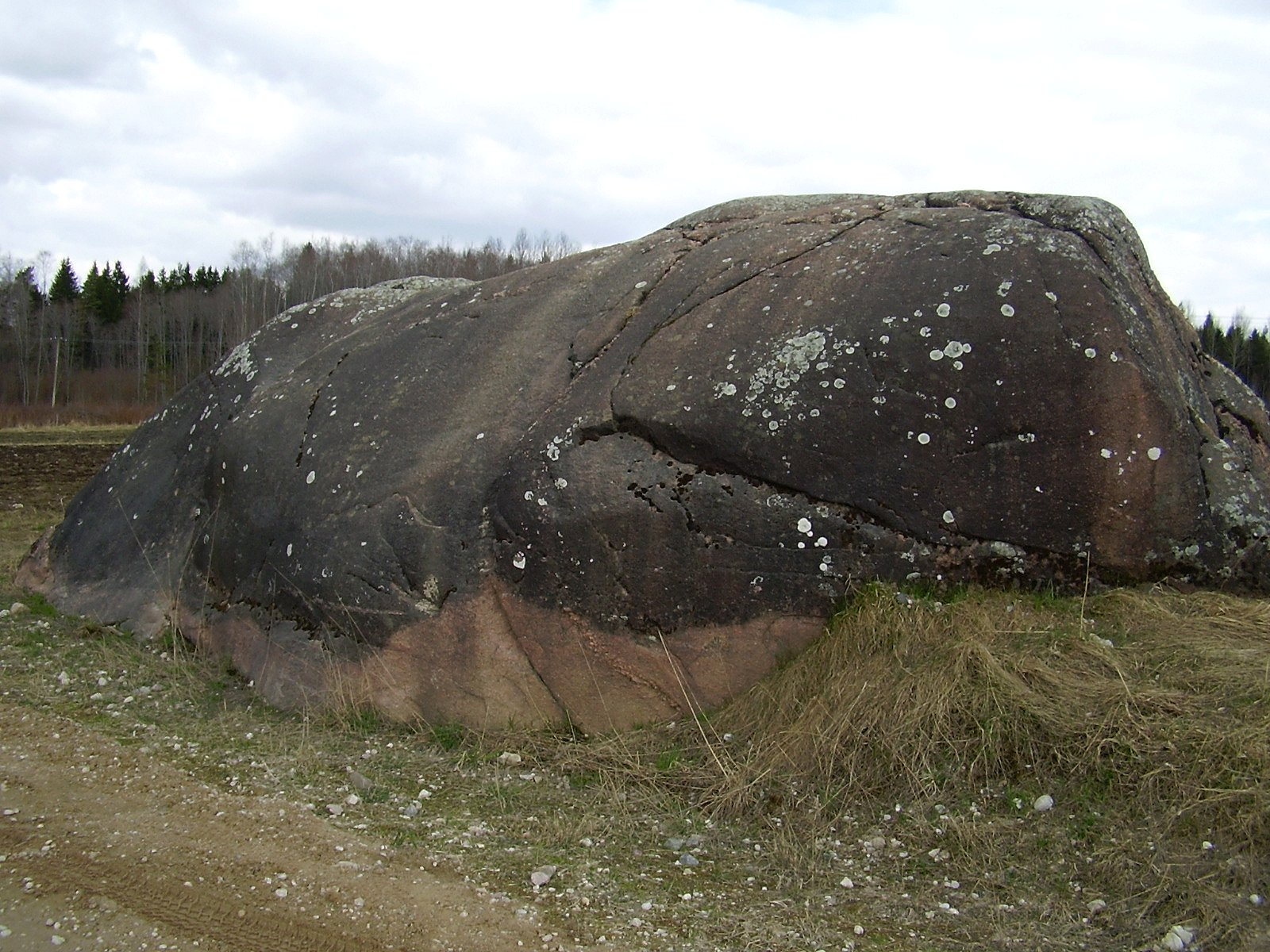 Vahastu Suurkivi